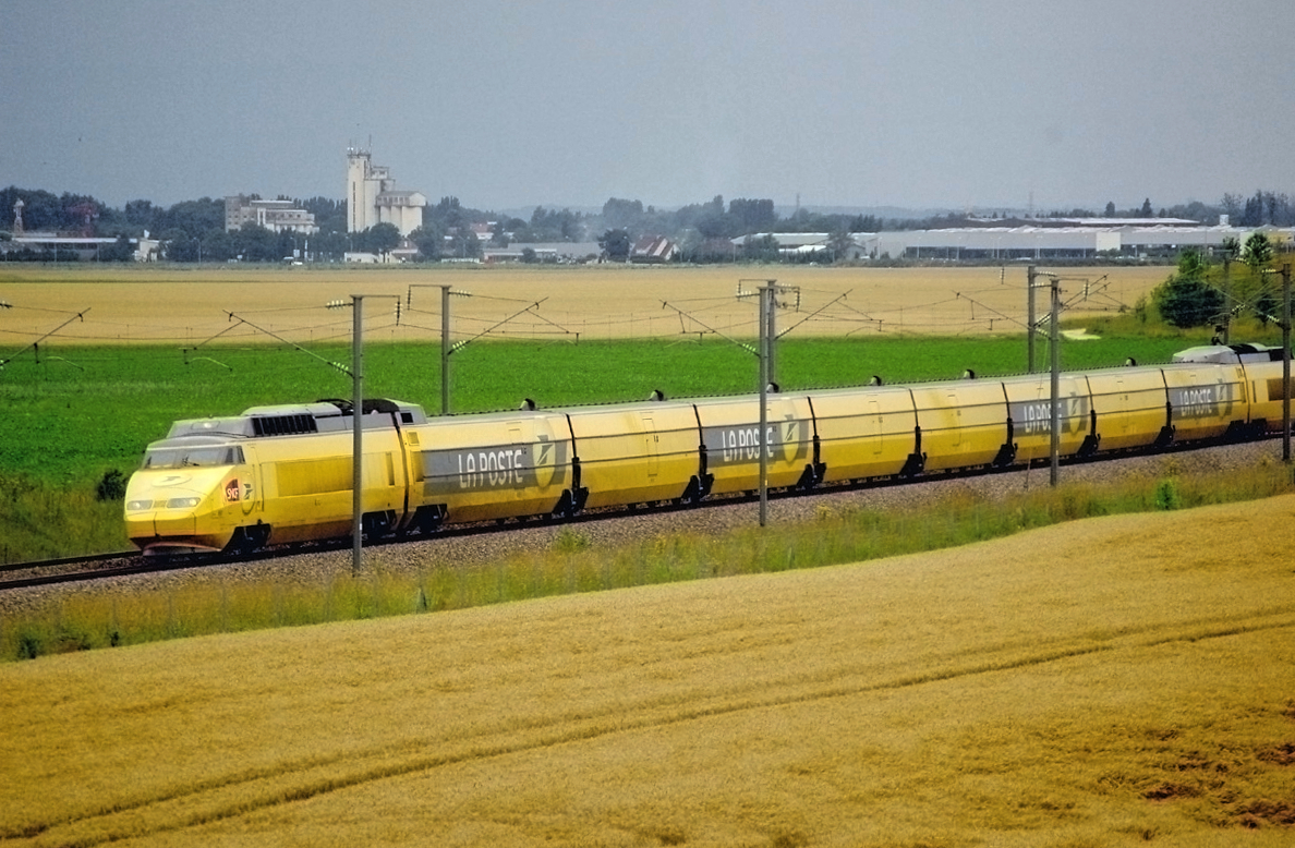 Rame d'un TGV postal à hauteur de la bifurcation de Chevry (77)TGV postal near Chevry, great surburds of Paris.